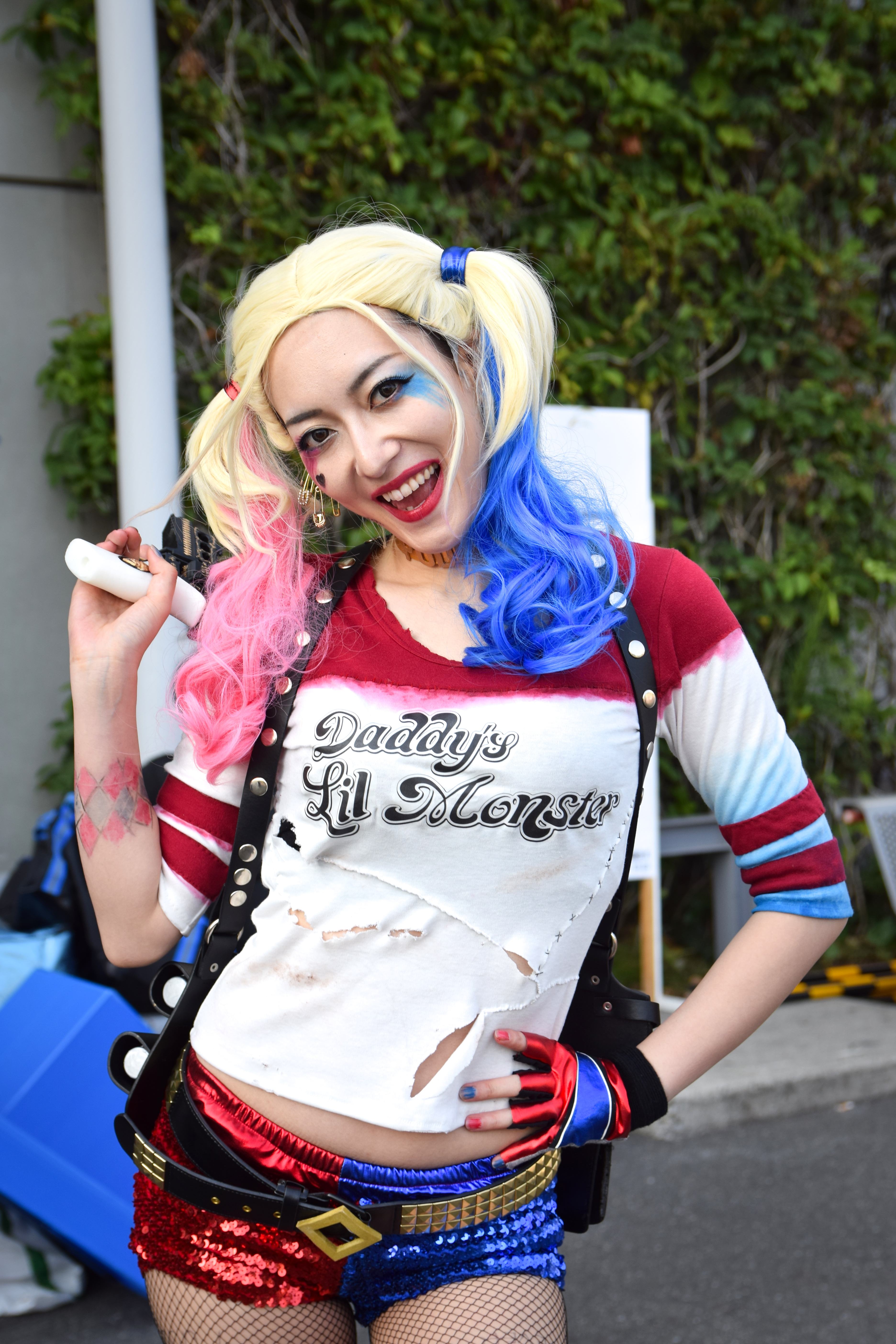 ハーレイ・クイン